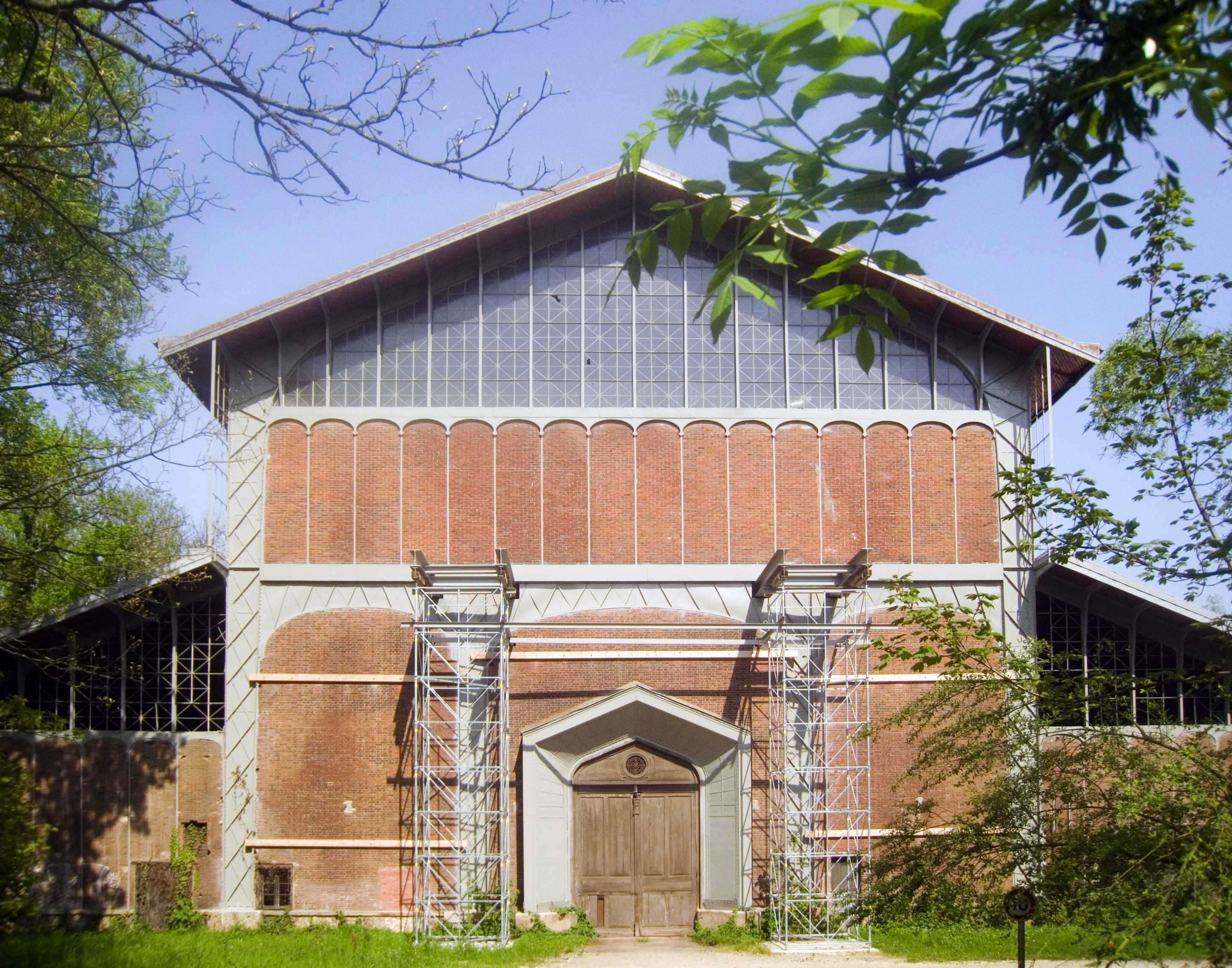 Façade du hangar Y, ancien hangar à dirigeables.